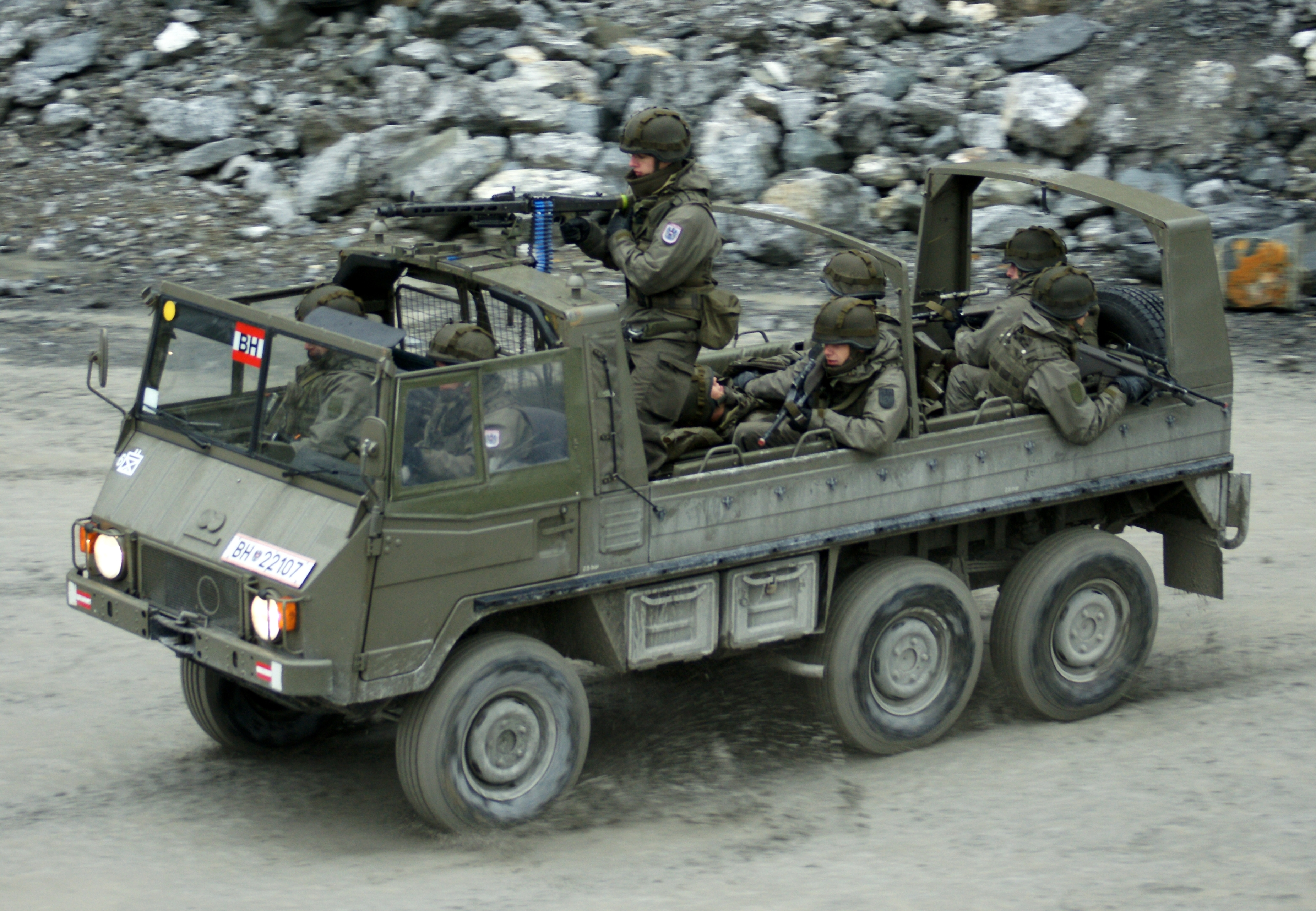 Im Zuge einer Road-Show zeigte das Österreichische Bundesheer im Dornbirner / Hohenemser Steinbruch das Rette- und Bergefahrzeug den Pinzgauer 712M. Motorleistung: 87 PS, Bauartgeschwindigkeit: 90 km/h, l/b/h: 4,9 / 1,8 / 2,2, Motor: 4 Zylinder; Benzin, Hubraum: 2499 cm³, Herstellerland: Österreich, Ausstattung: persönliche Schutzausrüstung, Ausrüstung für Rettungssprengen, Elektrowerkzeuge Brandschutzausrüstung, Atemschutzgeräte, Hebekissen, Schallortungsgeräte, Schneidewerkzeuge, pneumatische Abbaugeräte, hydraulische Werkzeuge, Strahlenmessgeräte, Beleuchtung, Hitzeschutzausrüstung, Stromerzeuger.